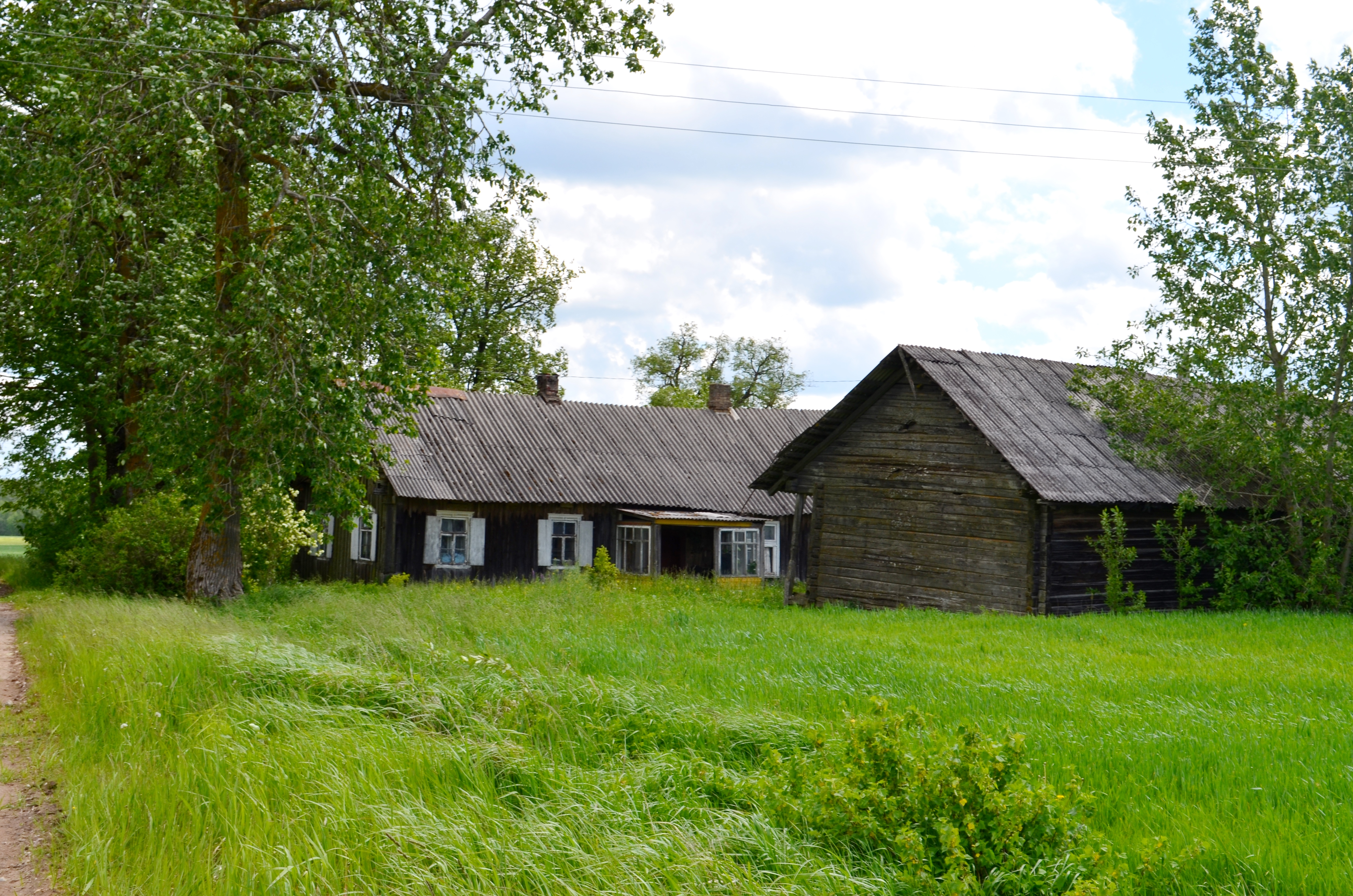 Vėjeliškiai, Panevėžio raj.